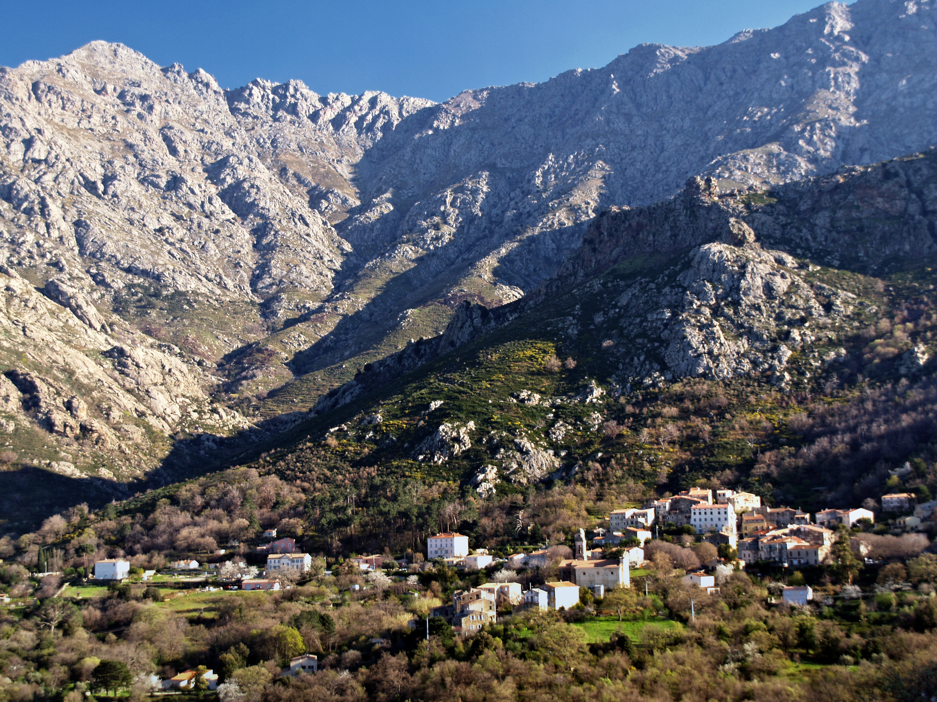 Feliceto (Corsica) - Vue du village